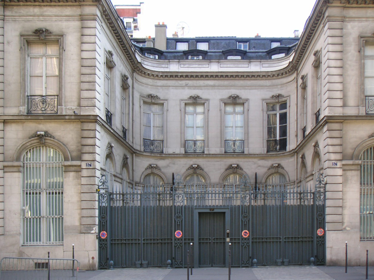 Sujet : Maison construite par Charles De Wailly pour lui-même, 57 rue La Boétie, Paris. Date de l'immeuble : 1776 Date de la photo : 12/03/2006 Auteur de la photo : Utilisateur:Justelipse